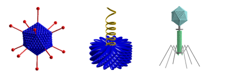 ヌクレオカプシドの対称性: （左）正二十面体様（アデノウイルス）（中）らせん状（タバコモザイクウイルス）（右）複雑な対称性（バクテリオファージ）